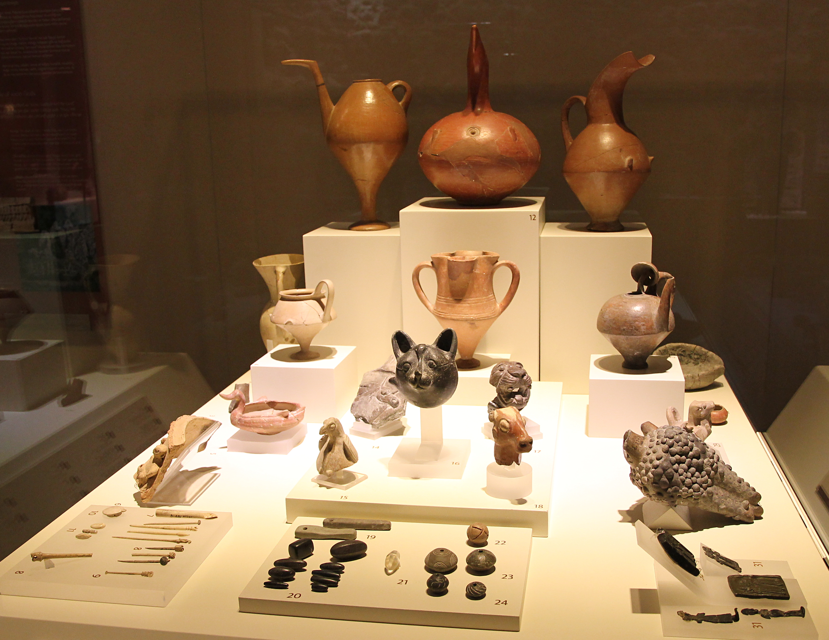 Museum für anatolische Zivilisationen, Ankara, Türkei, Funde aus Alişar Höyük